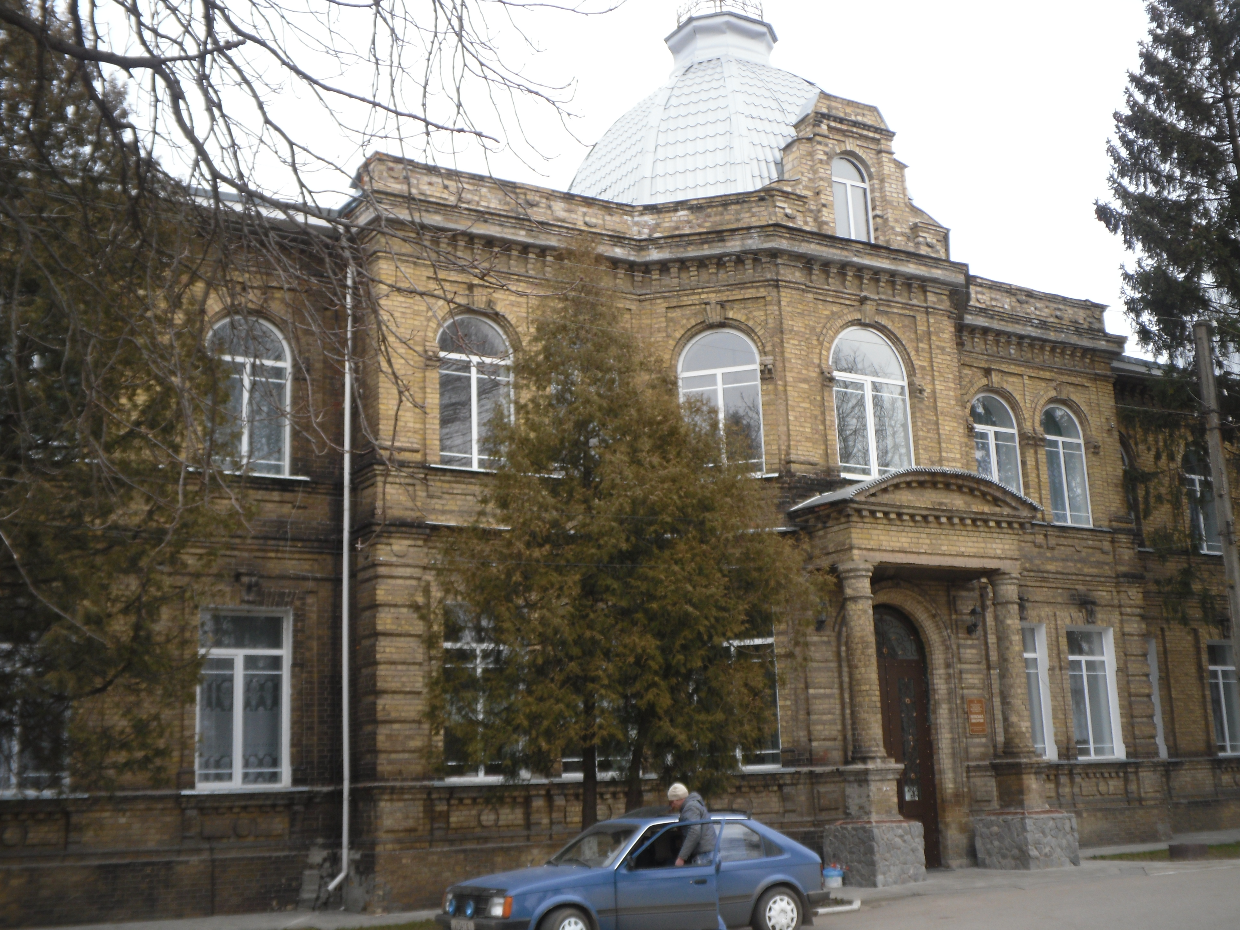 Київський архітектор К.Сроковський побудував земську лікарню в 1905-1907 рр